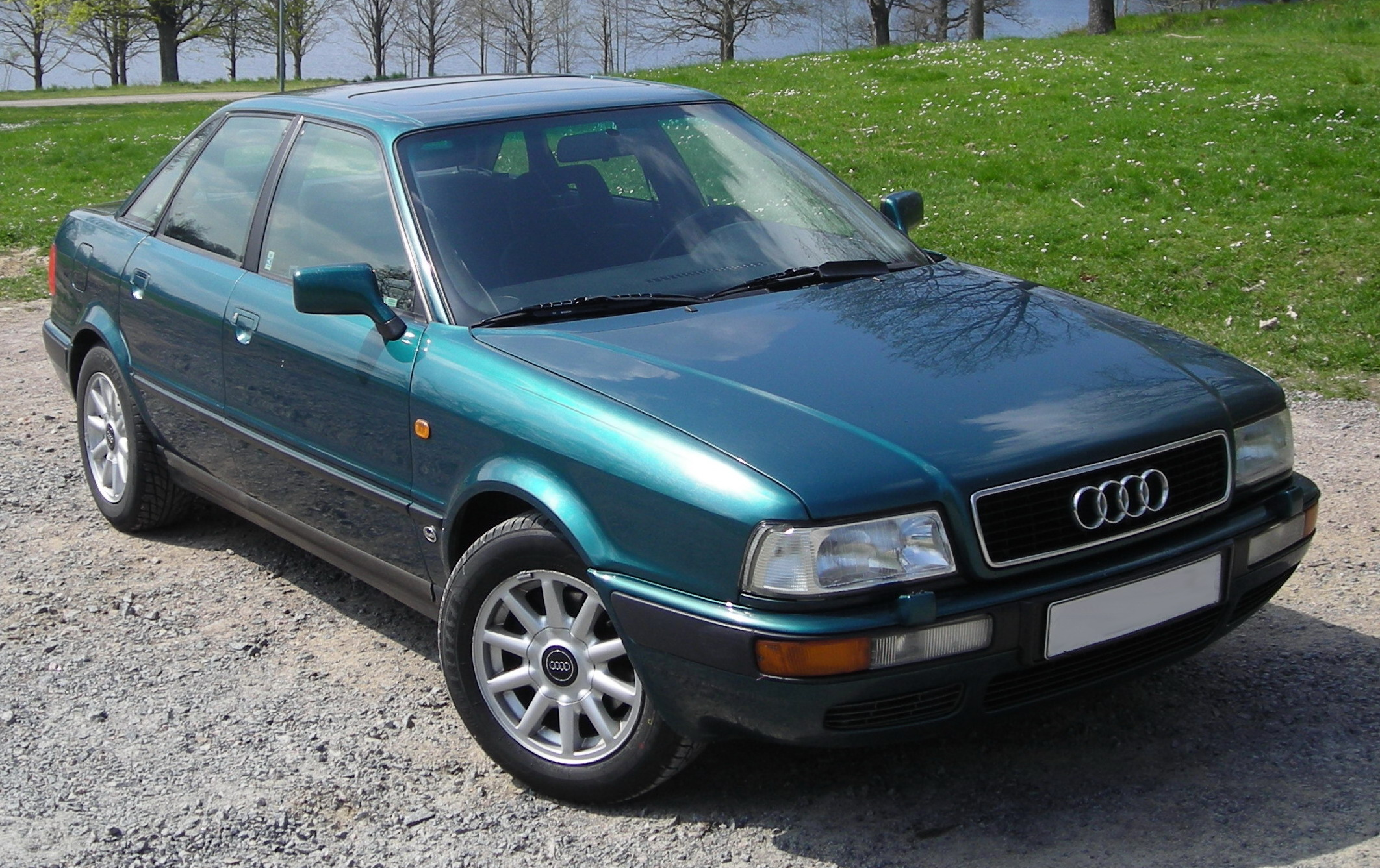 Audi80-1992 Sweden 2007